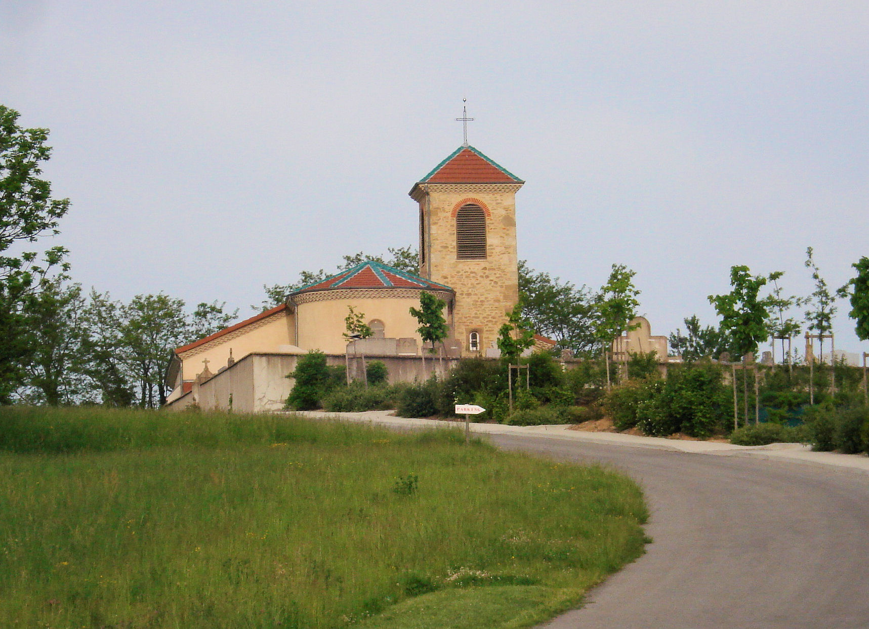 église Saint Romain de Tersanne dans la Drôme (26)